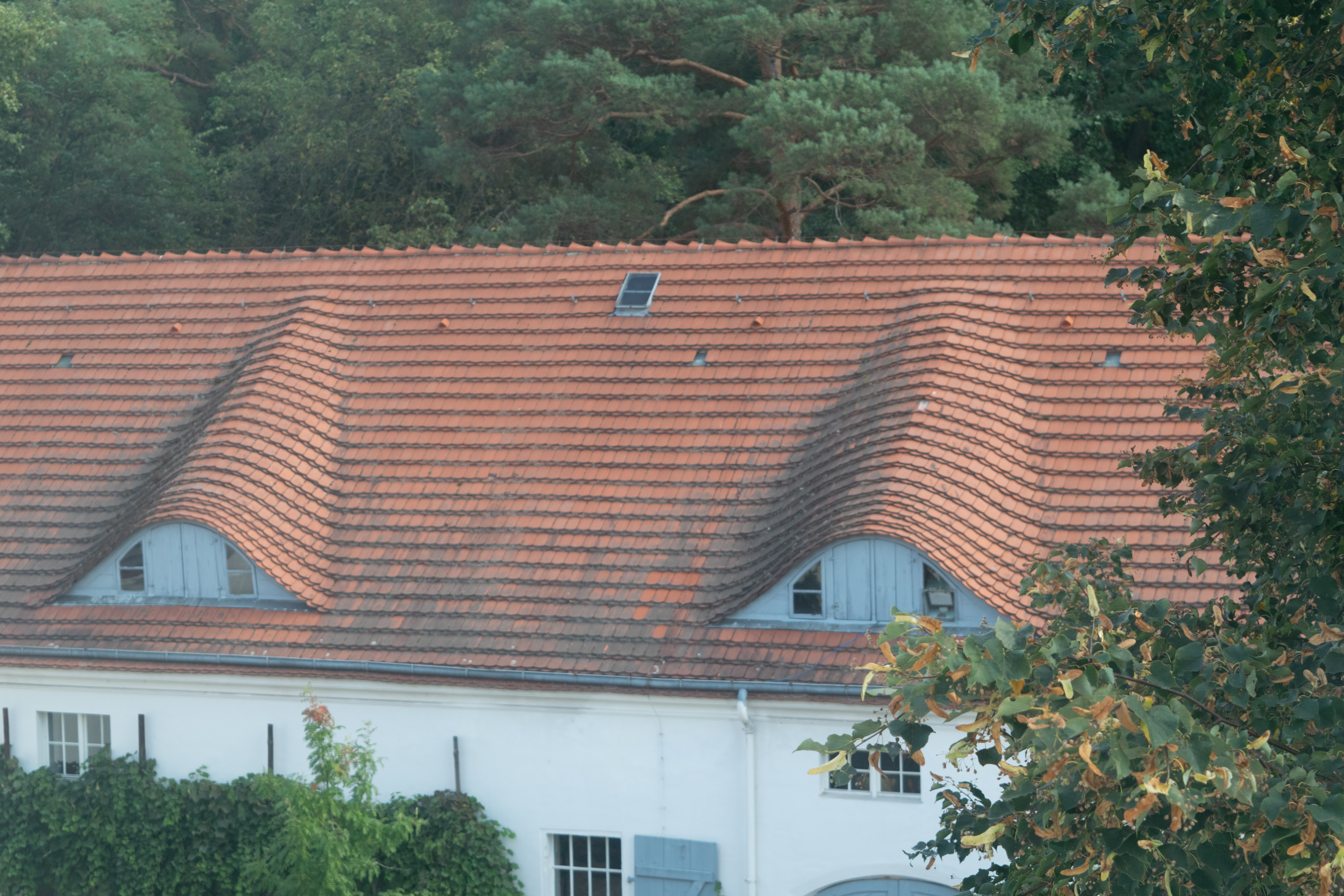 Glam on Tour Jagdschloss Grunewald, Berlin